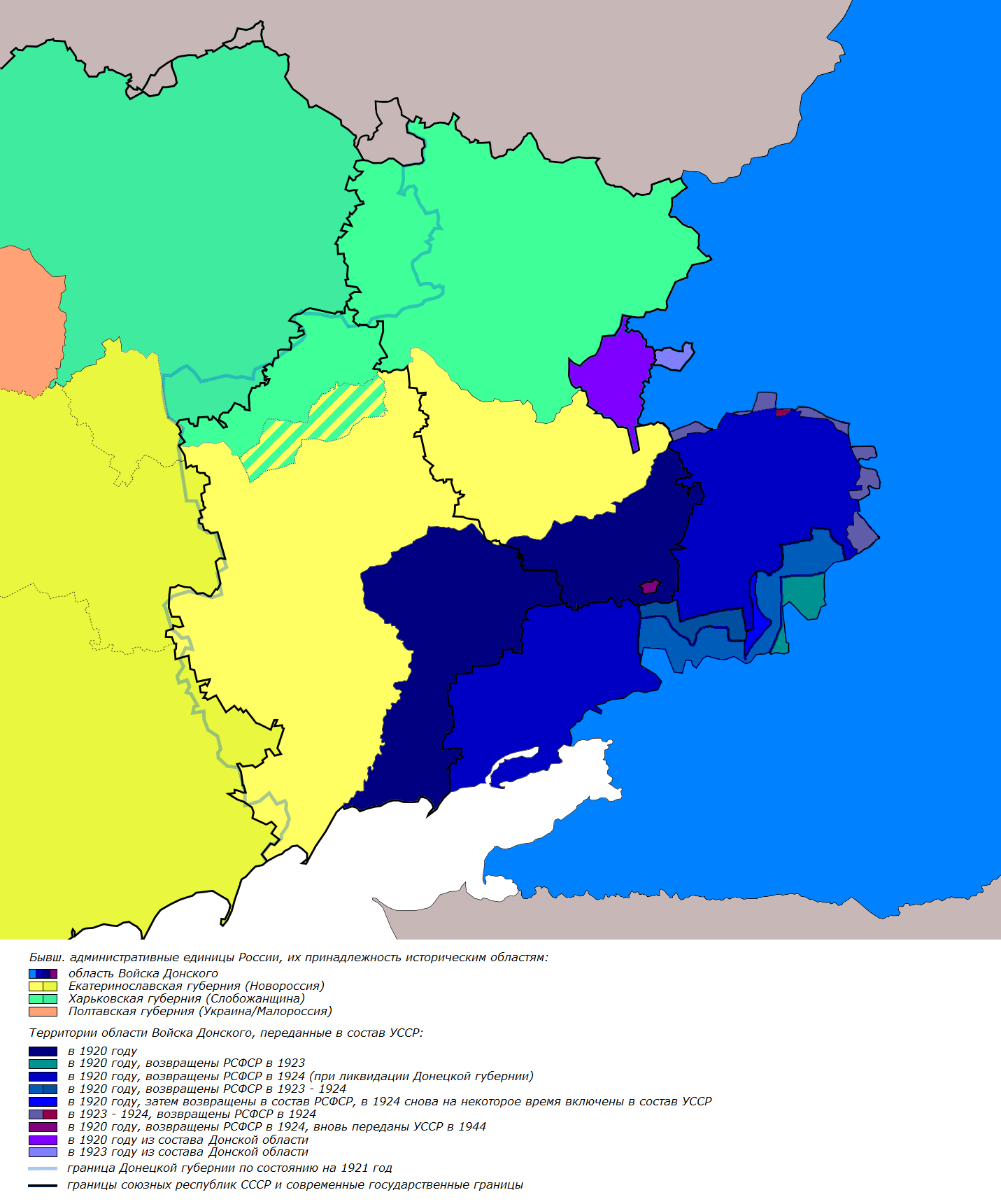 Изменение границ области Войска Донского после революции